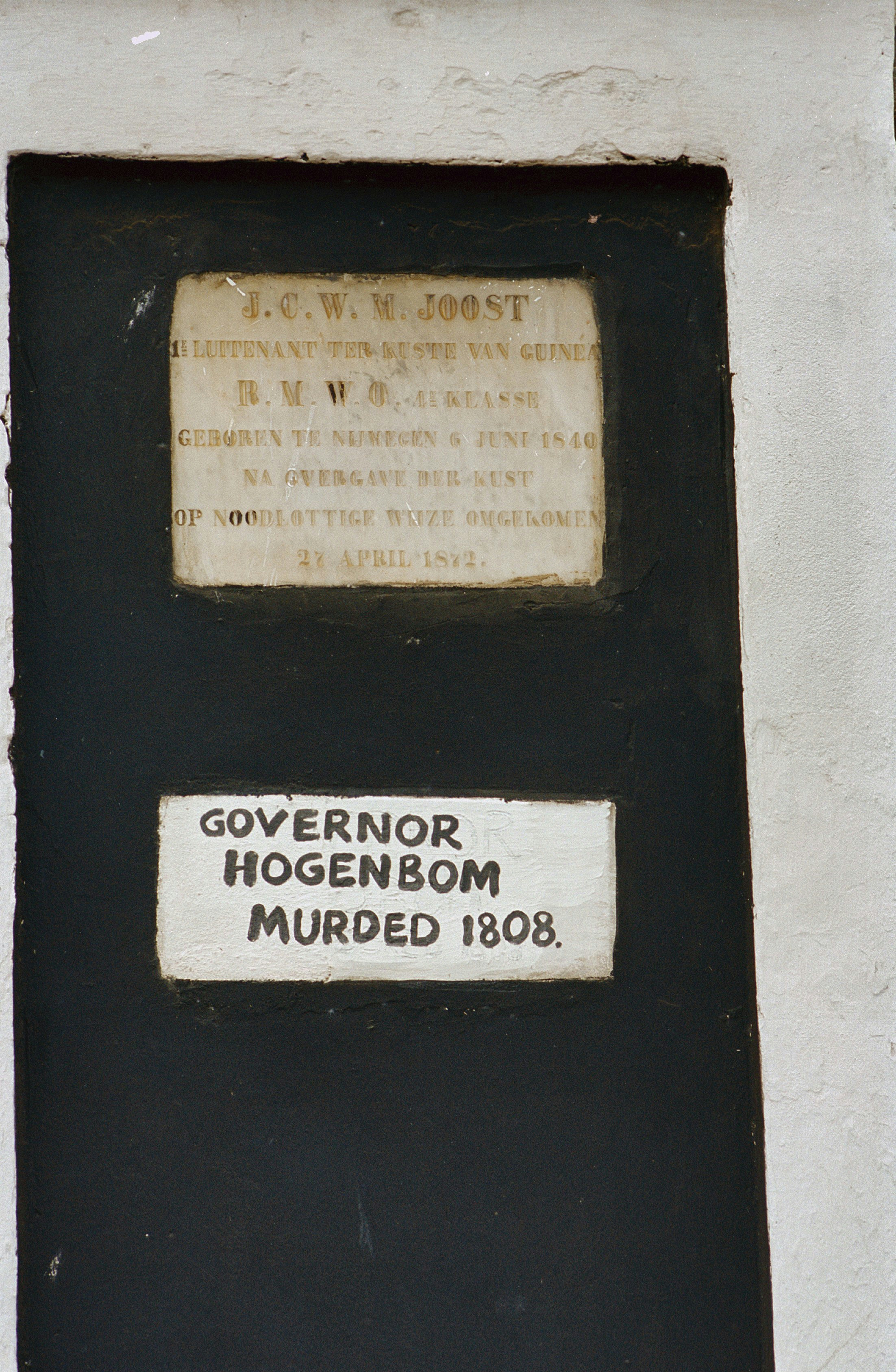 Dutch Cemetery: Herinnerings plaquettes aan gouverneur Hogenbom en luitenand Joost (opmerking: Ghana reis Loek Tangel)